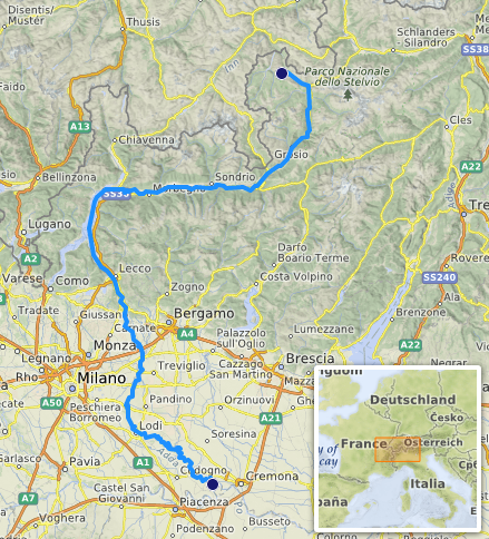 carte réalisée d'après umap.openstreetmap This map may be incomplete, and may contain errors. Don't rely solely on it for navigation.